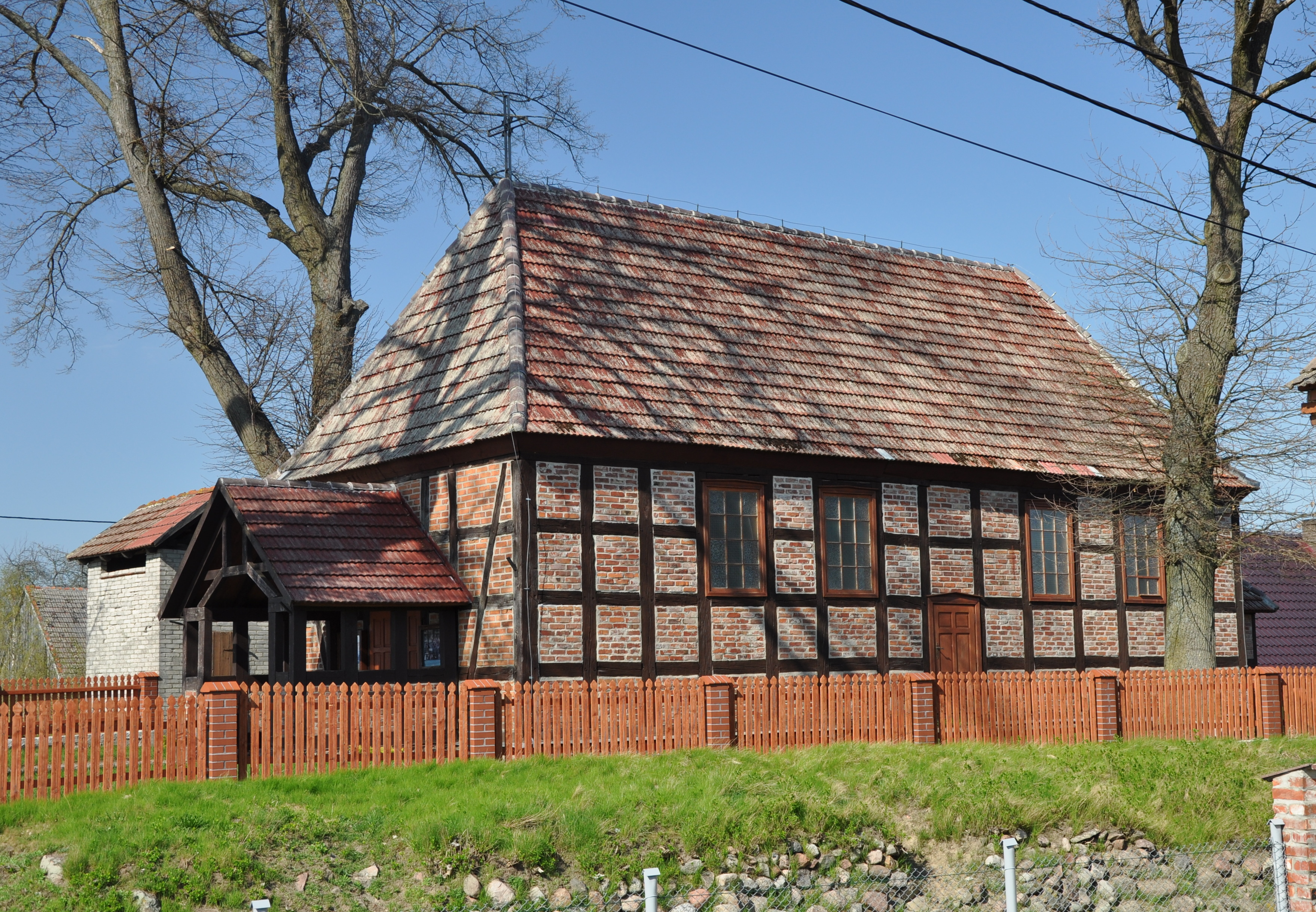 Kościół filialny pw. Wniebowzięcia NMP w Buślarach – ujęcie od południa